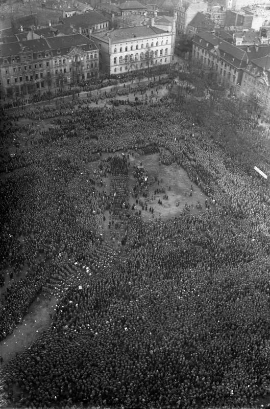 Magdeburg. Reichsbannertag "Schwarz-Rot-Gold" fand unter Beteiligung hunderttausender von Republikanern am 22. Februar in Magdeburg statt. Blick aus der Vogelperspektive auf die hunderttausend versammelten Republikanern auf dem Domplatz in Magdeburg.